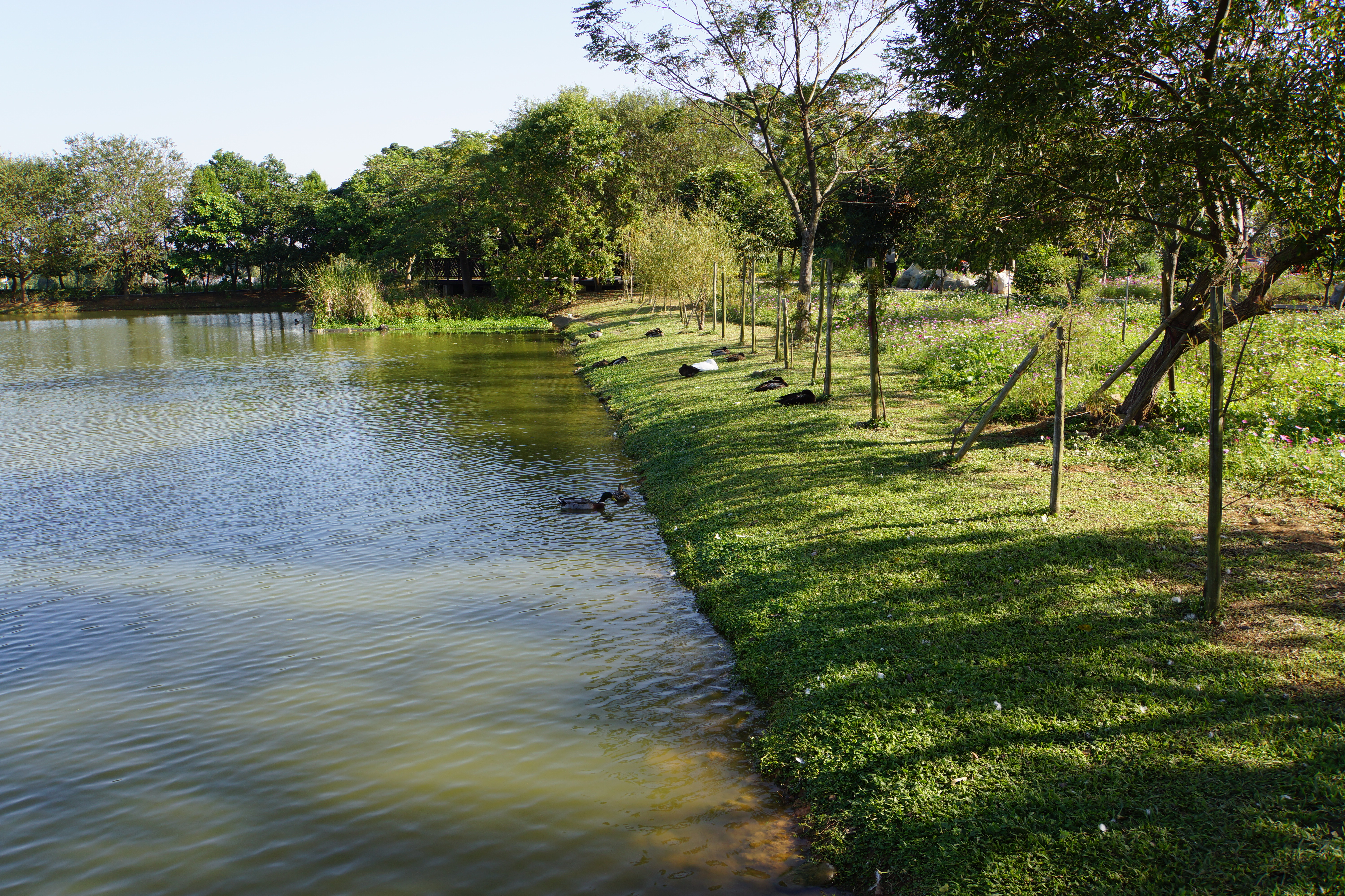 Bade Pond Eco Park 八德埤塘生態園區